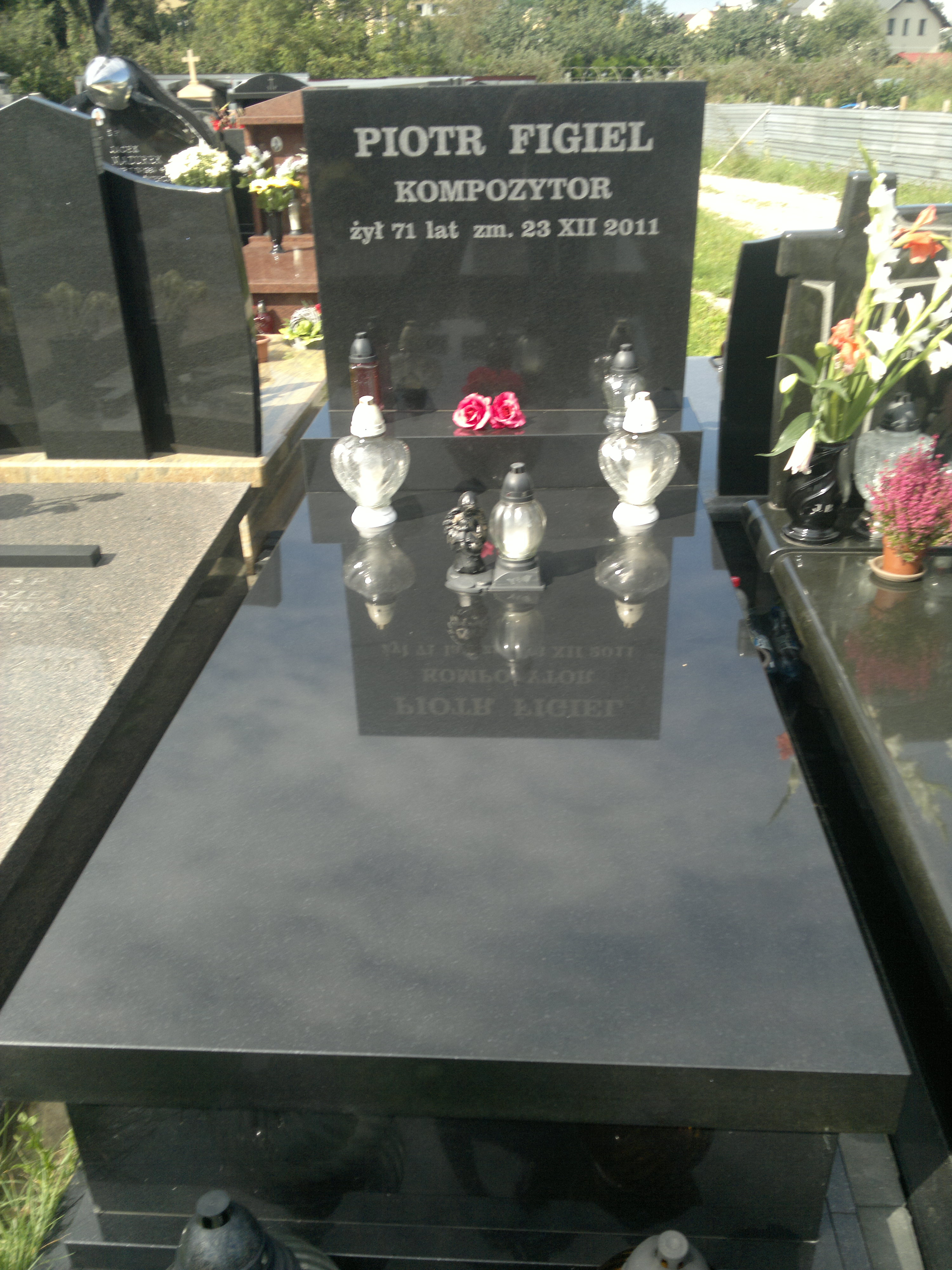 Grób Piotra Figla na warszawskim Cmentarzu na Służewie, 20 sierpnia 2014.